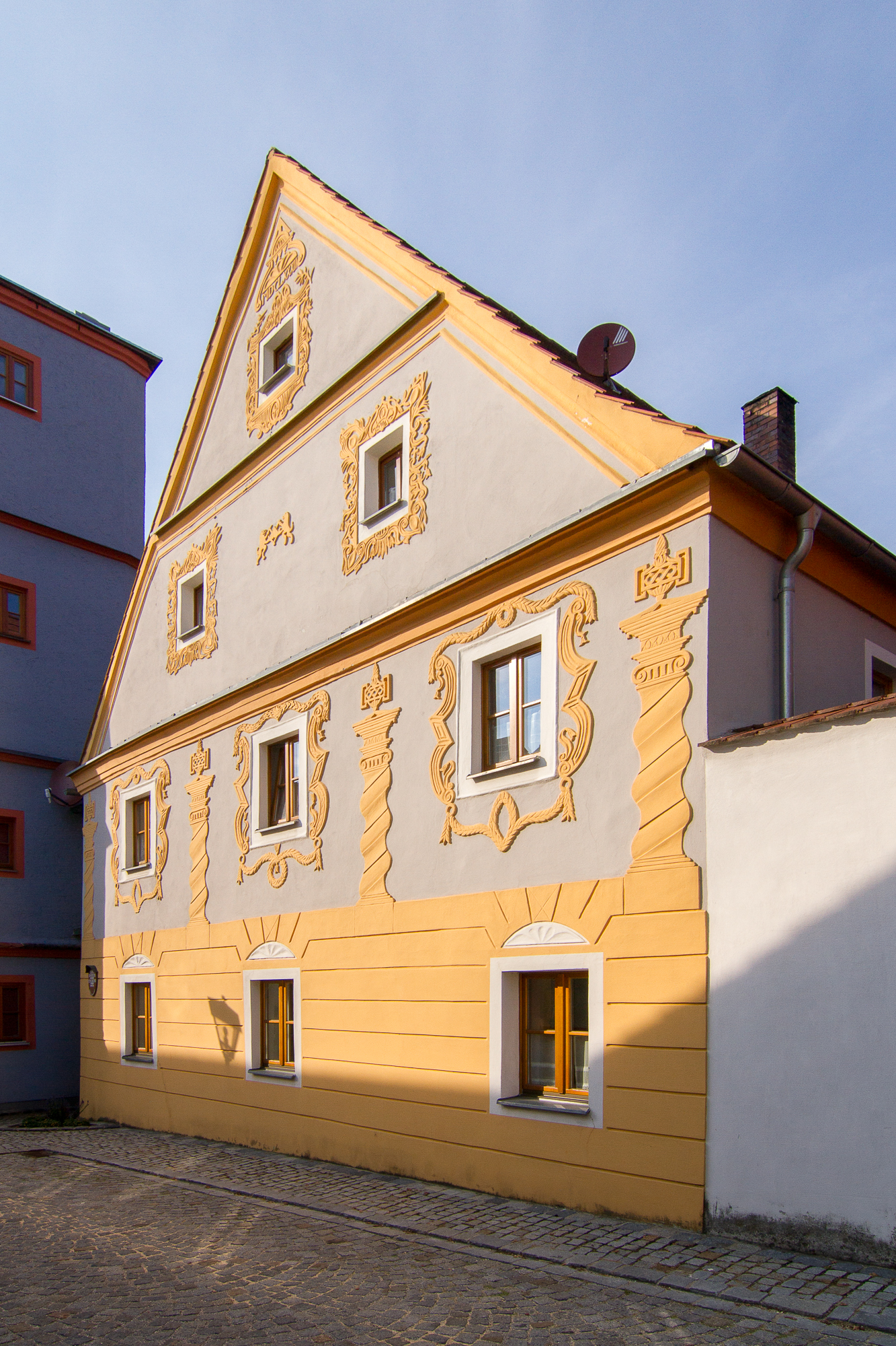 Wohnhaus; zweigeschossiger und giebelständiger Satteldachbau mit Stuckfassade, bez. 1682This is a photograph of an architectural monument.